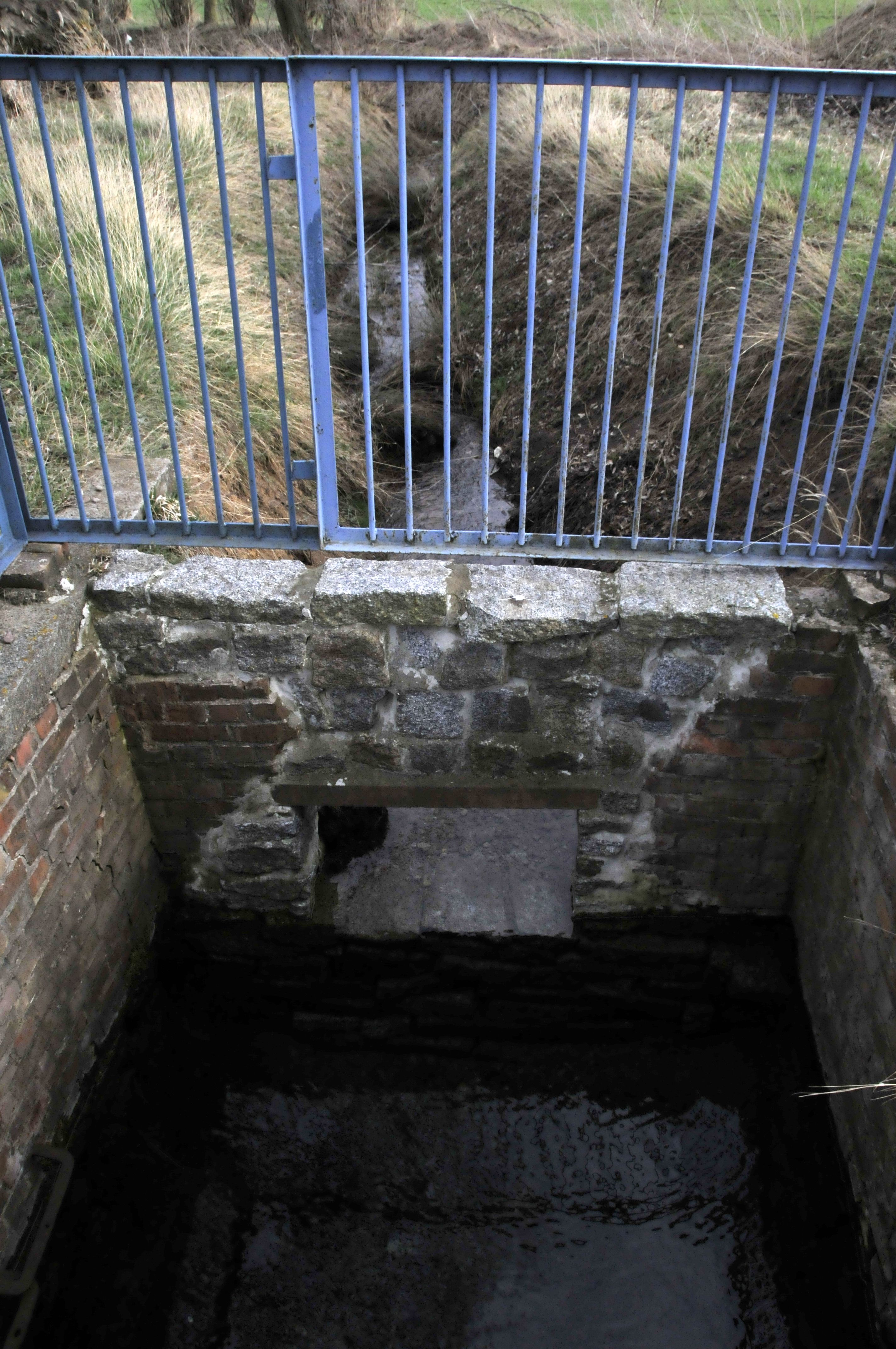 Eingefasste Quelle des Rettbach ("Siebgen-Quelle")